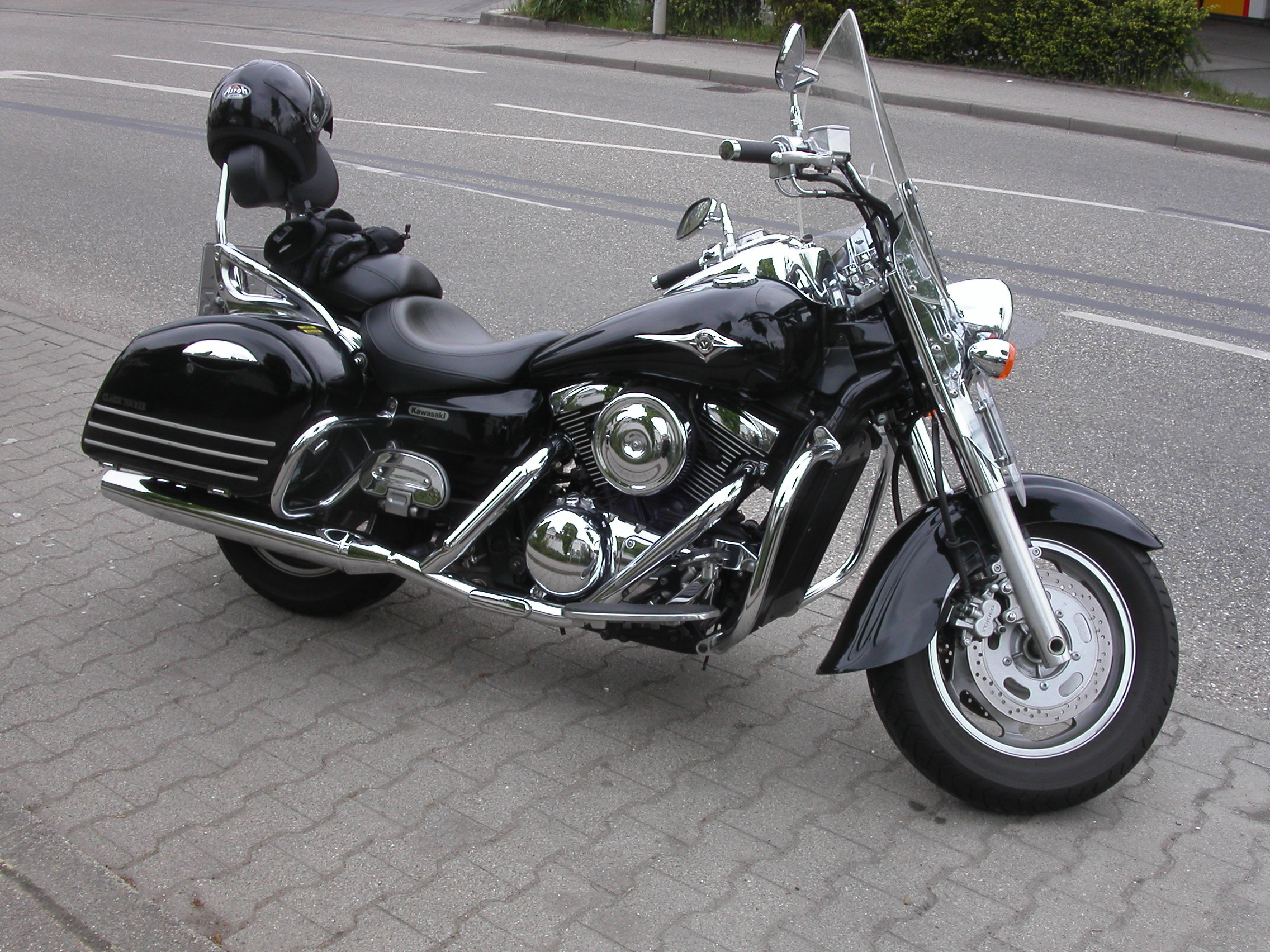 Kawasaki VN 1600 Classic Tourer